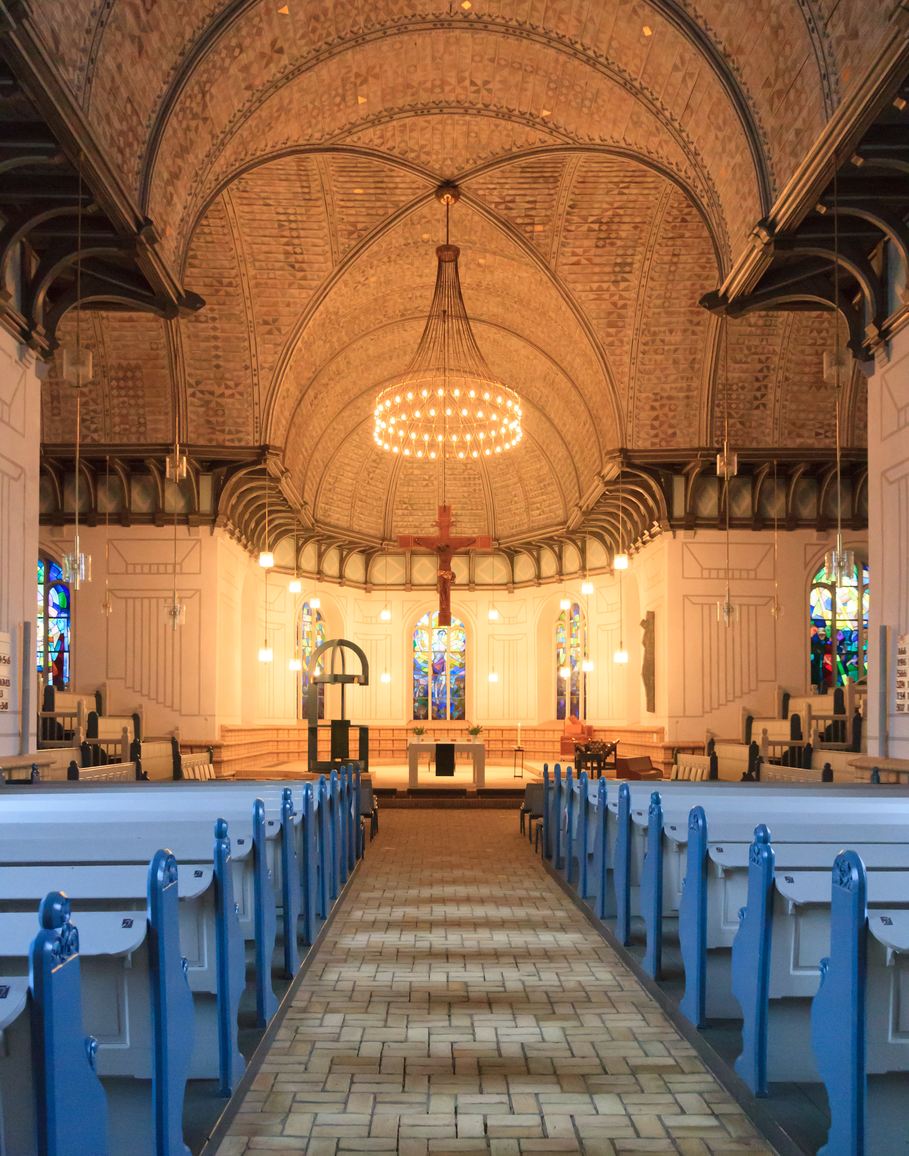 Saint Nicholas Church (Plön)